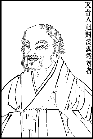 Zhanran (711-782) patriarca della scuola buddhista cinese Tiantai.